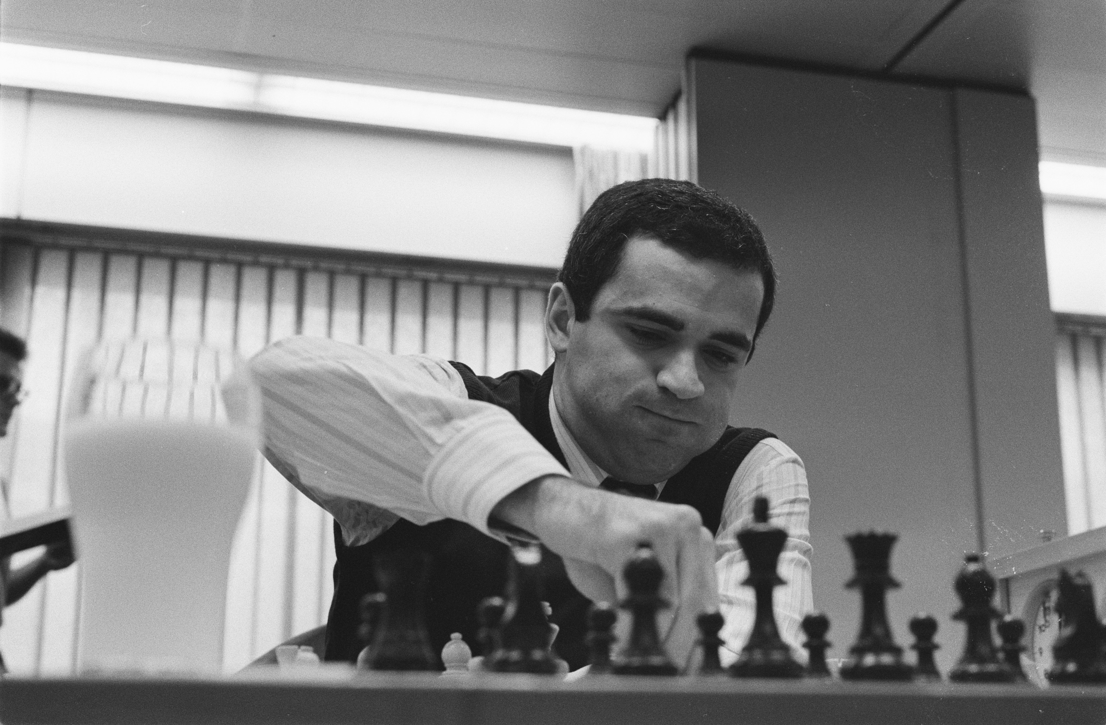 Collectie / Archief : Fotocollectie Anefo Reportage / Serie : [ onbekend ] Beschrijving : Interpolis schaaktoernooi; Garri Kasparov Datum : 20 september 1989 Locatie : Noord-Brabant, Tilburg Trefwoorden : schaken, toernooien Persoonsnaam : Kasparov Garri, Kasparov, Garri Fotograaf : Bogaerts, Rob / Anefo Auteursrechthebbende : Nationaal Archief Materiaalsoort : Negatief (zwart/wit) Nummer archiefinventaris : bekijk toegang 2.24.01.05 Bestanddeelnummer : 934-5025